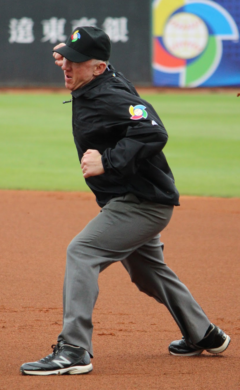 Lance Barksdale